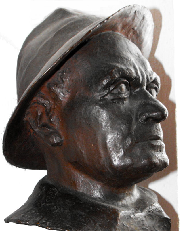 Der Hamburger Bildhauer Ludwig Kunstmann: Selbstporträt, in Bronze gegossen.